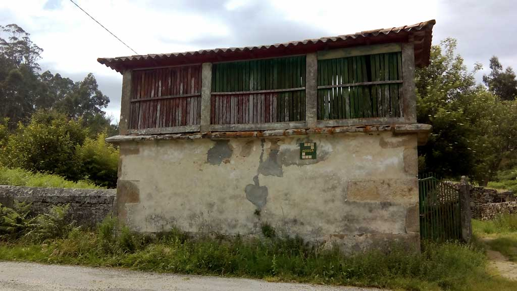 Hórreo de Mougá.